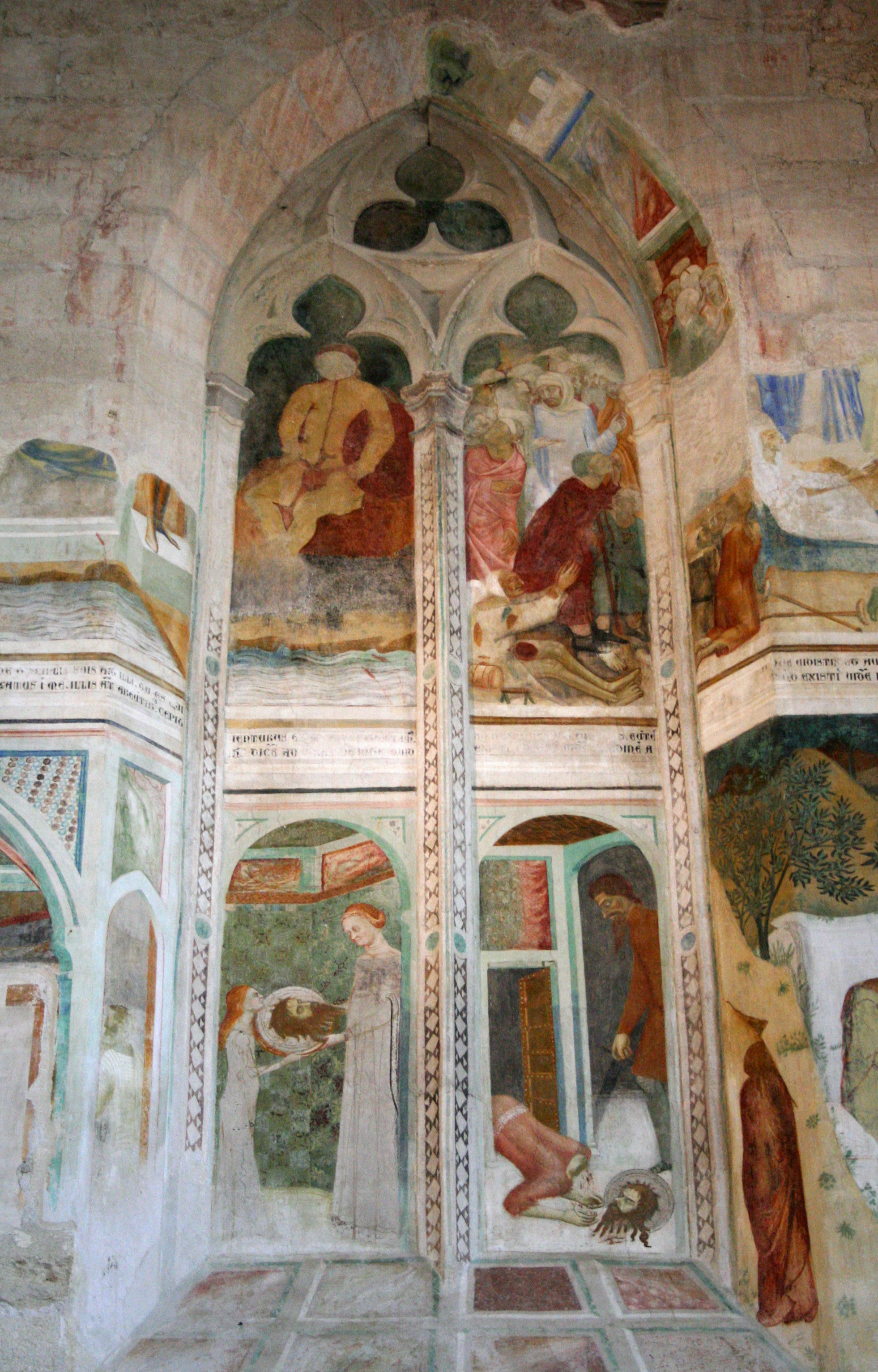 Fresque de Matteo Giovannetti peintes vers 1355 dans la chapelle des fresques de la chartreuse de Villeneuve-lès-Avignon représentant des scènes de la vie de saint Jean-Baptiste.